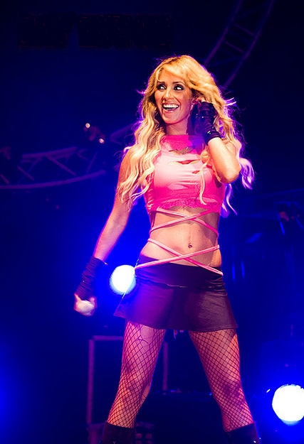 Anahí durante um show em 2008.